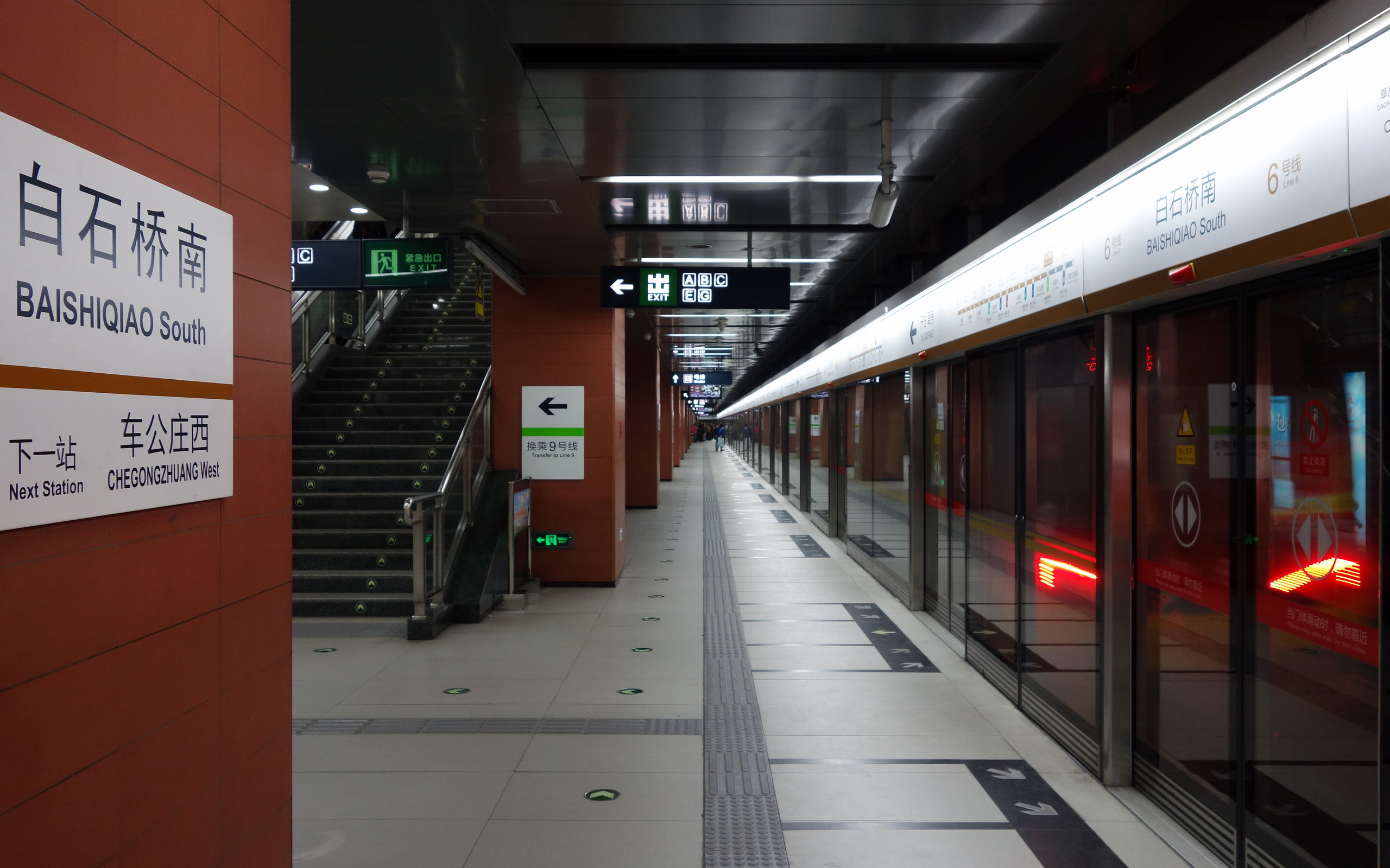 白石桥南站6号线站台